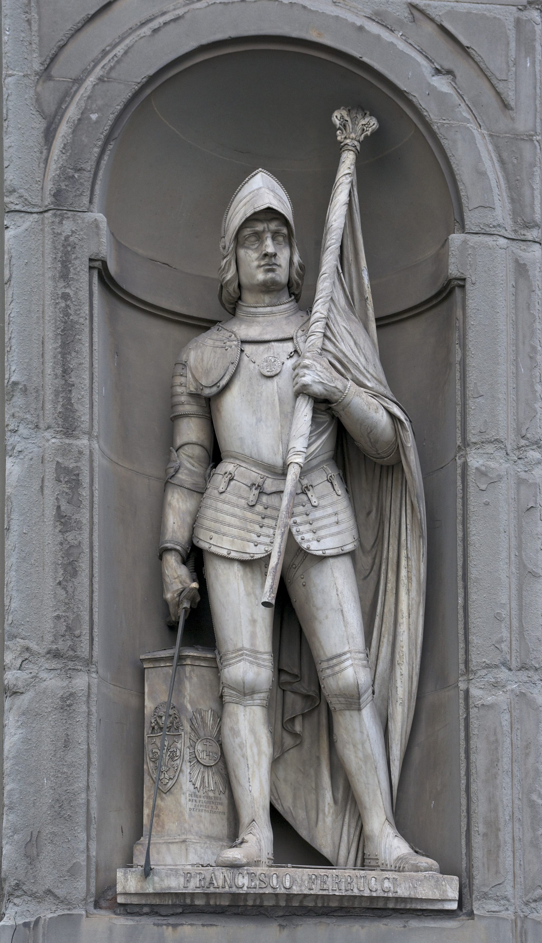 Statue de Francesco Ferrucci (1489-1530), condottiere de la République de Florence, palais des Offices à Florence, Italie